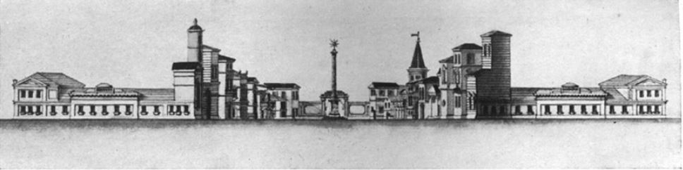 Царское Село, комплекс зданий Дворцового запасного двора с кордегардиями (1774—1775, архитектор В. И. Неелов) и Крымская (Сибирская) колонна (1777, архитектор, предположительно, А. Ринальди; 1785, художник Г. И. Козлов) в центре, располагавшиеся за границей Екатерининского парка, на территории, примыкающей к Баболовскому парку, в том виде, как они выглядели в период царствования Екатерины II